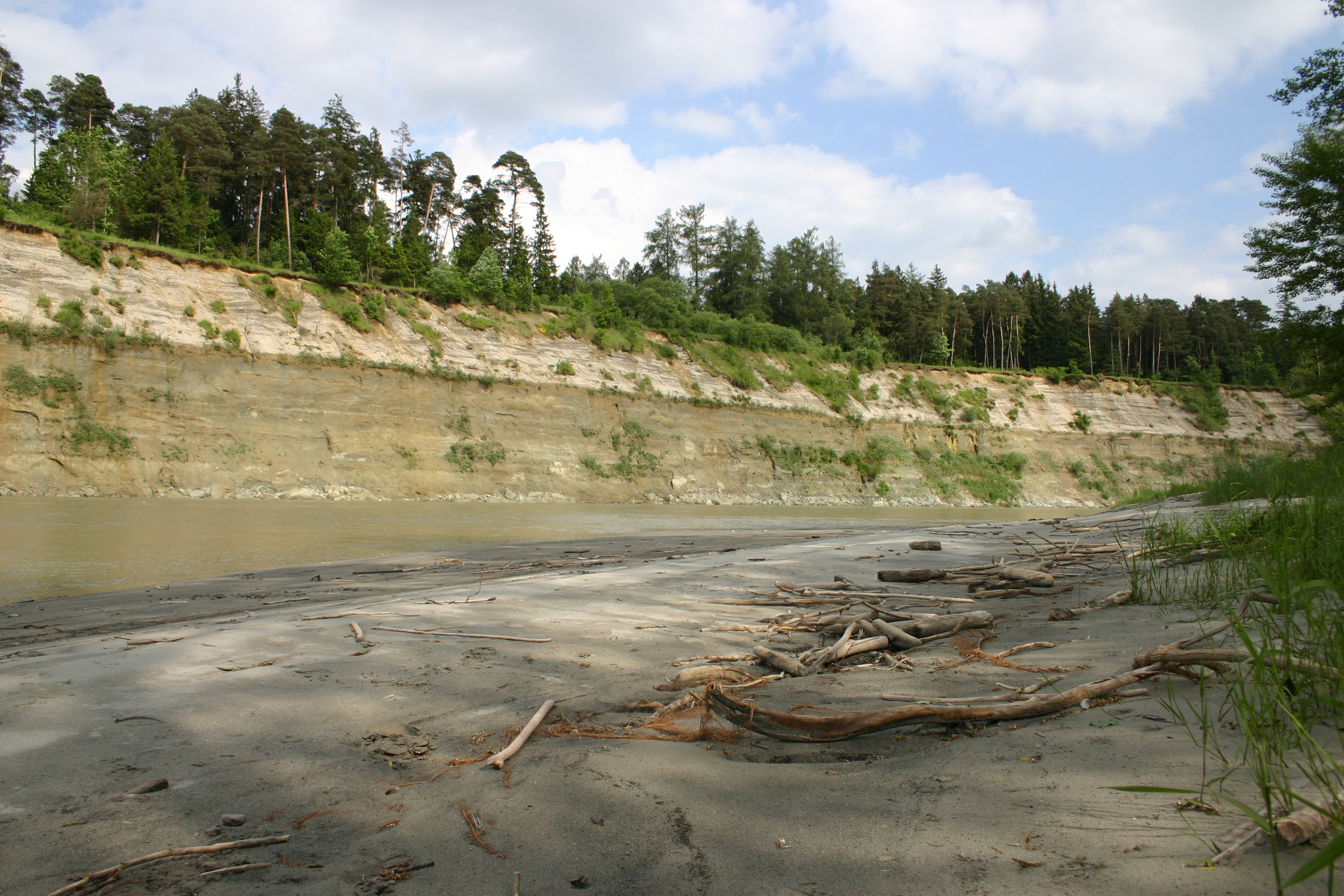 Das Bild zeigt den Inn in der Gemeinde Waldkraiburg und am gegenüberliegenden Ostufer den Prallhang des Inns bei Heisting (Geotop-Nr. 183R010) in der Gemeinde Polling in der Nähe von Mühldorf am Inn; Fluss-Km 113,4.